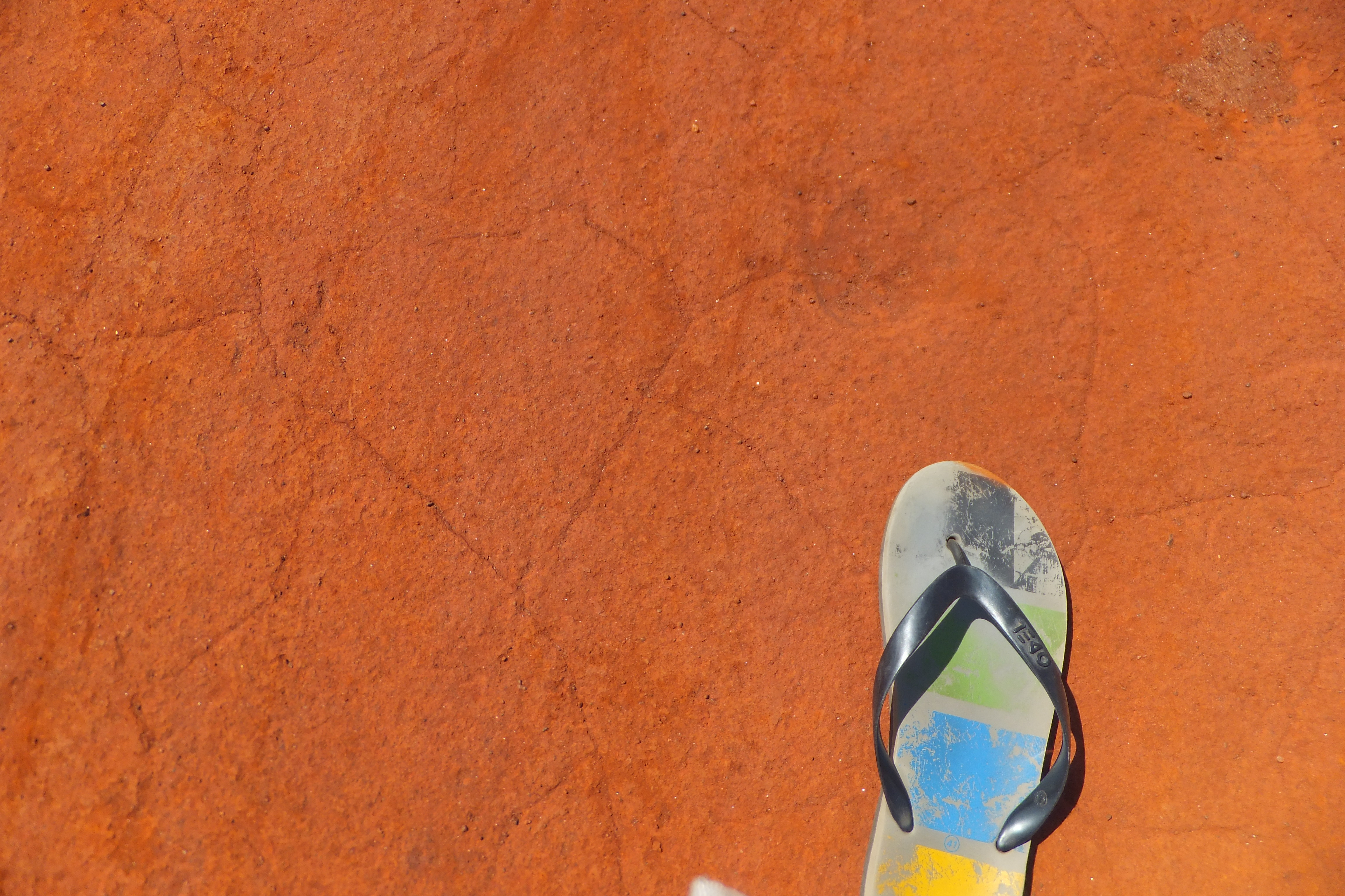 සිංහල: උස්සංගොඩ පොළොව